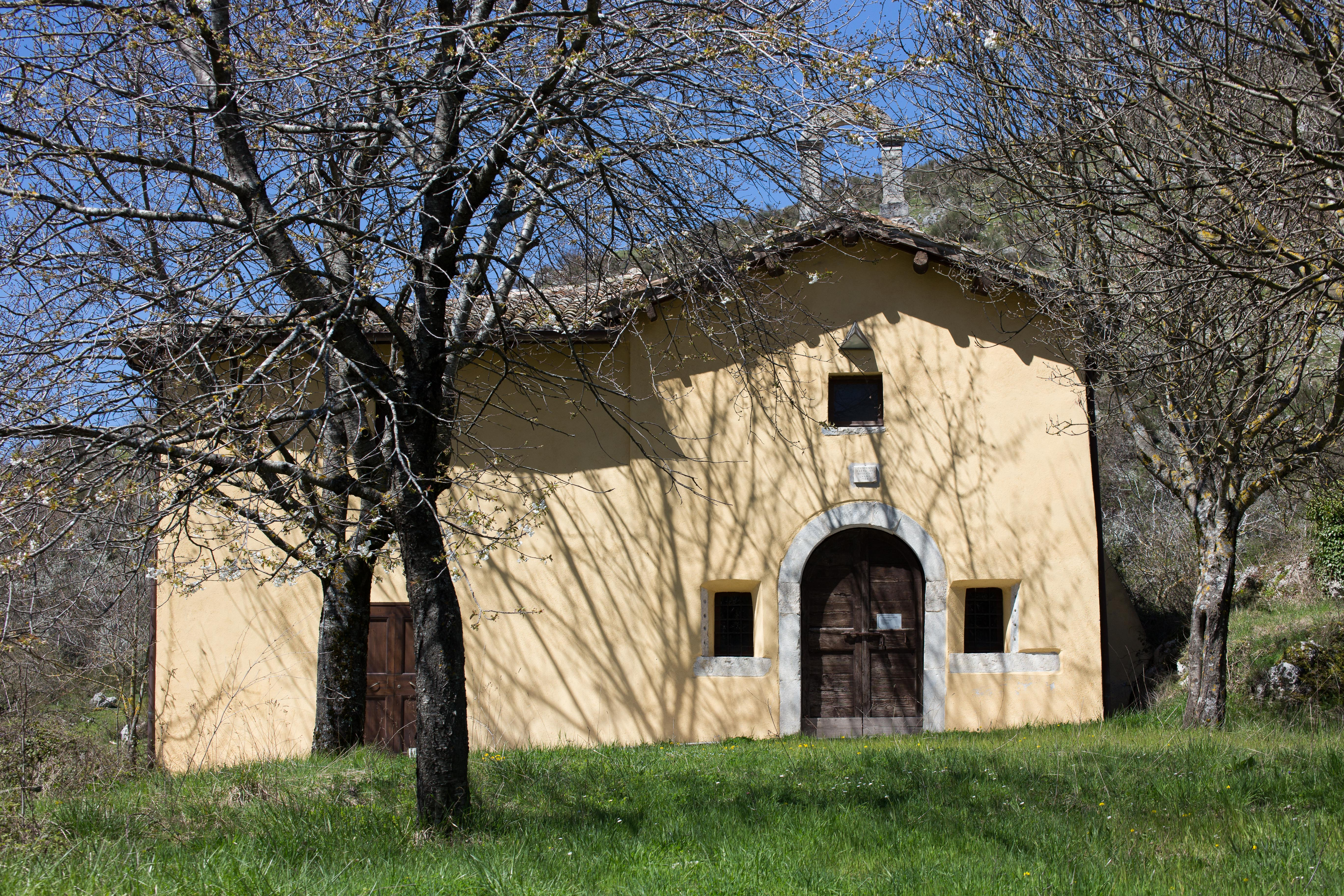 esterno